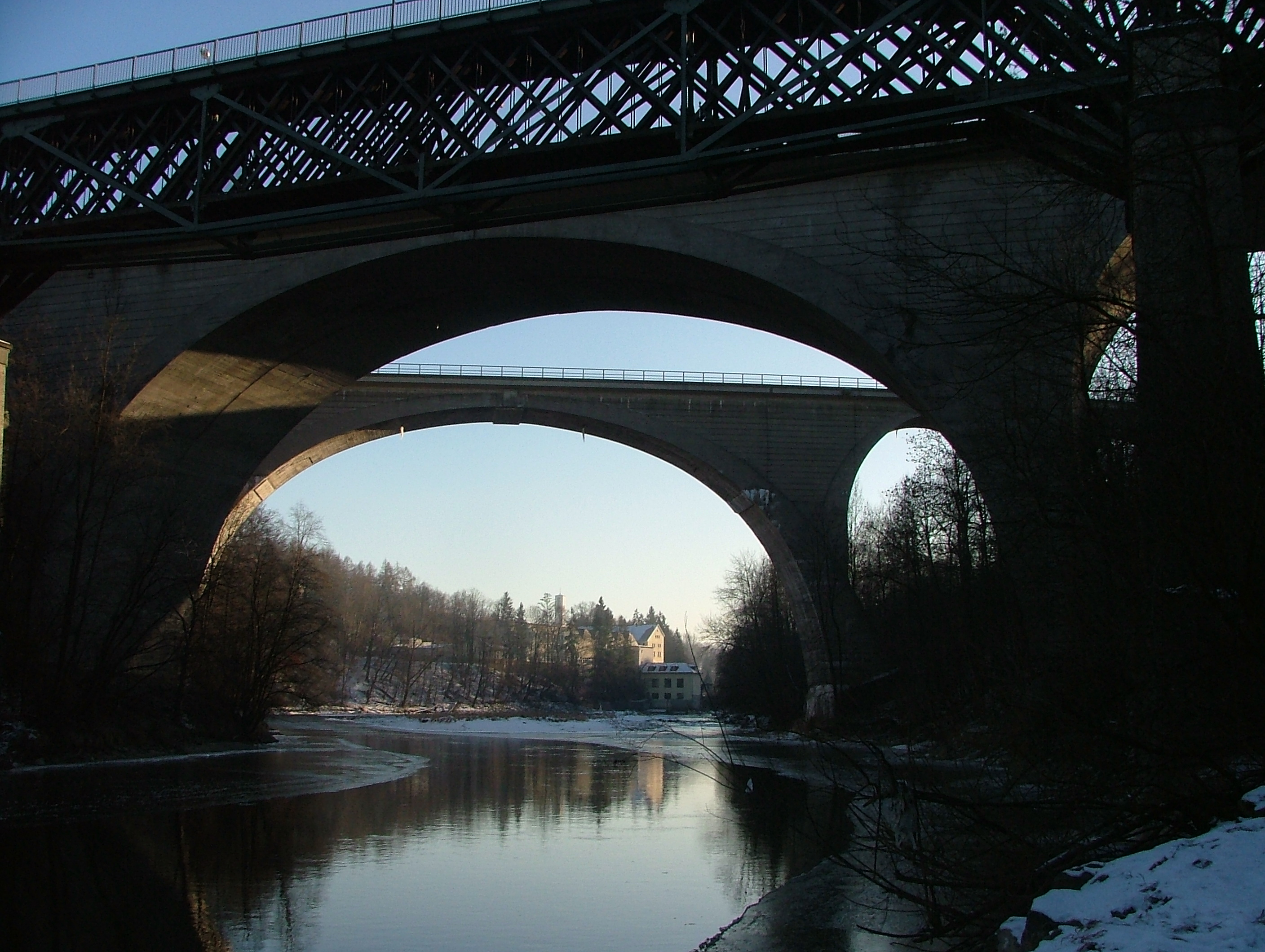 Unter den Illerbrücken, Kempten